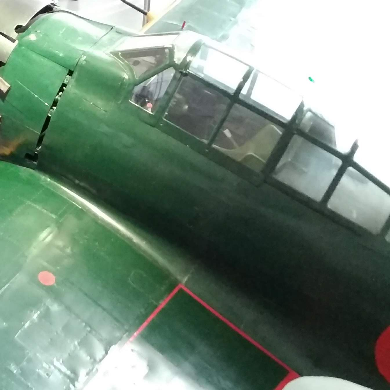 零式艦上戦闘機六二型の風防